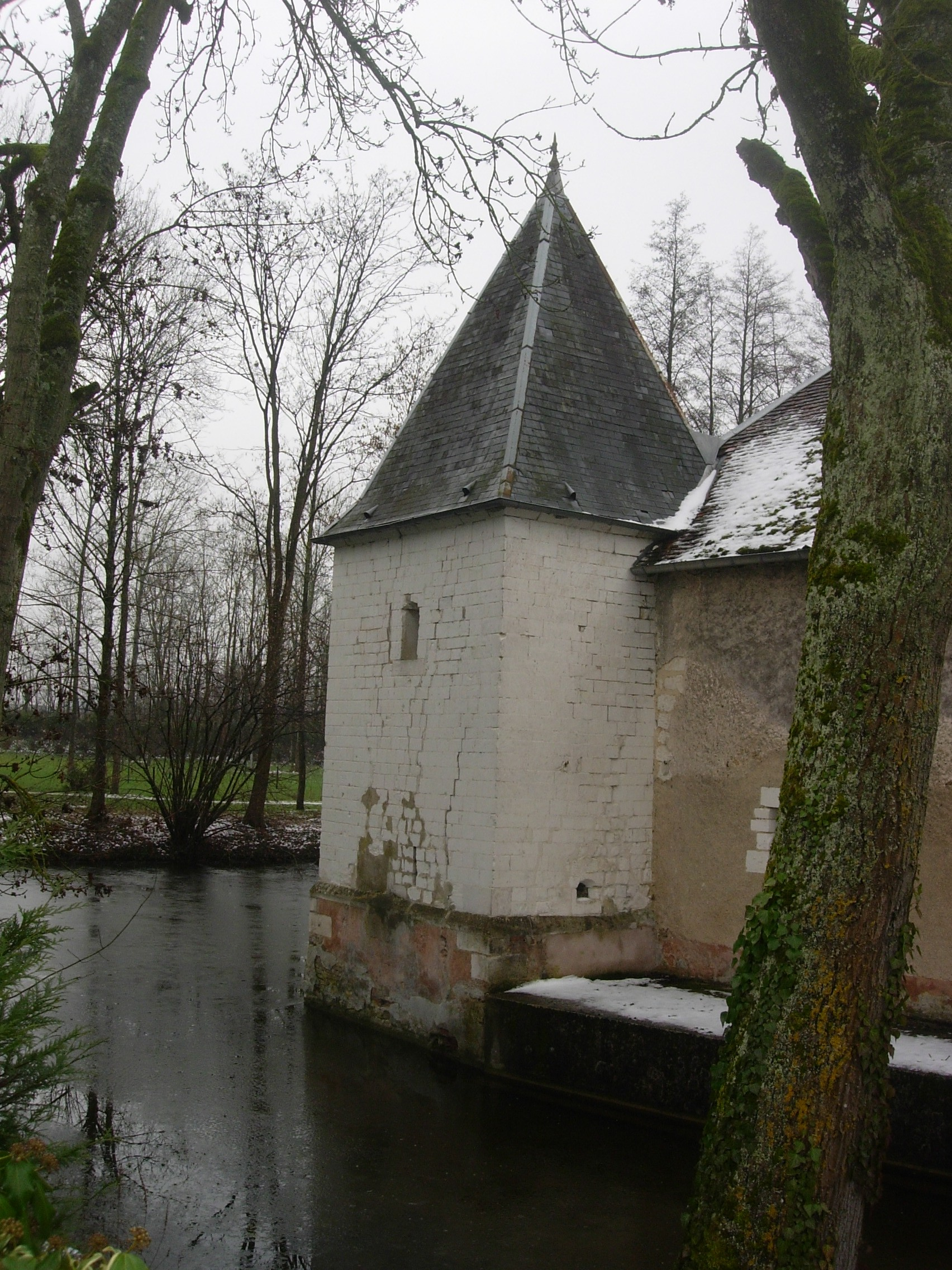 Château de Rosières-près-Troyes (Aube)